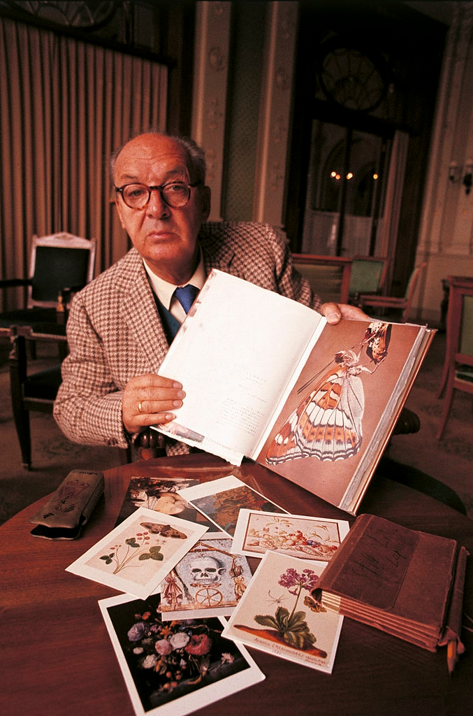 Vladimir Nabokov, Montreux, October 1969